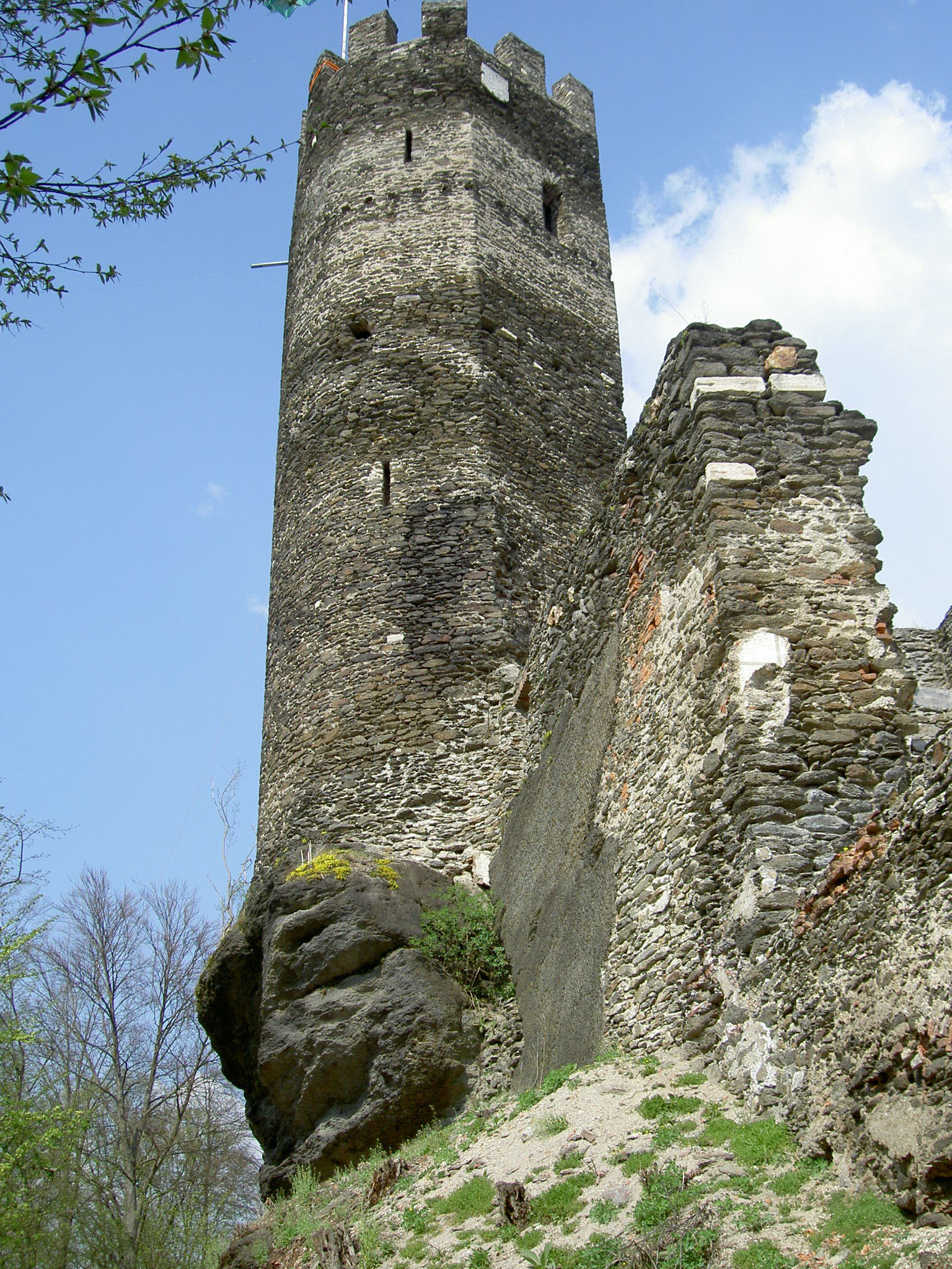 Burgruine Krems